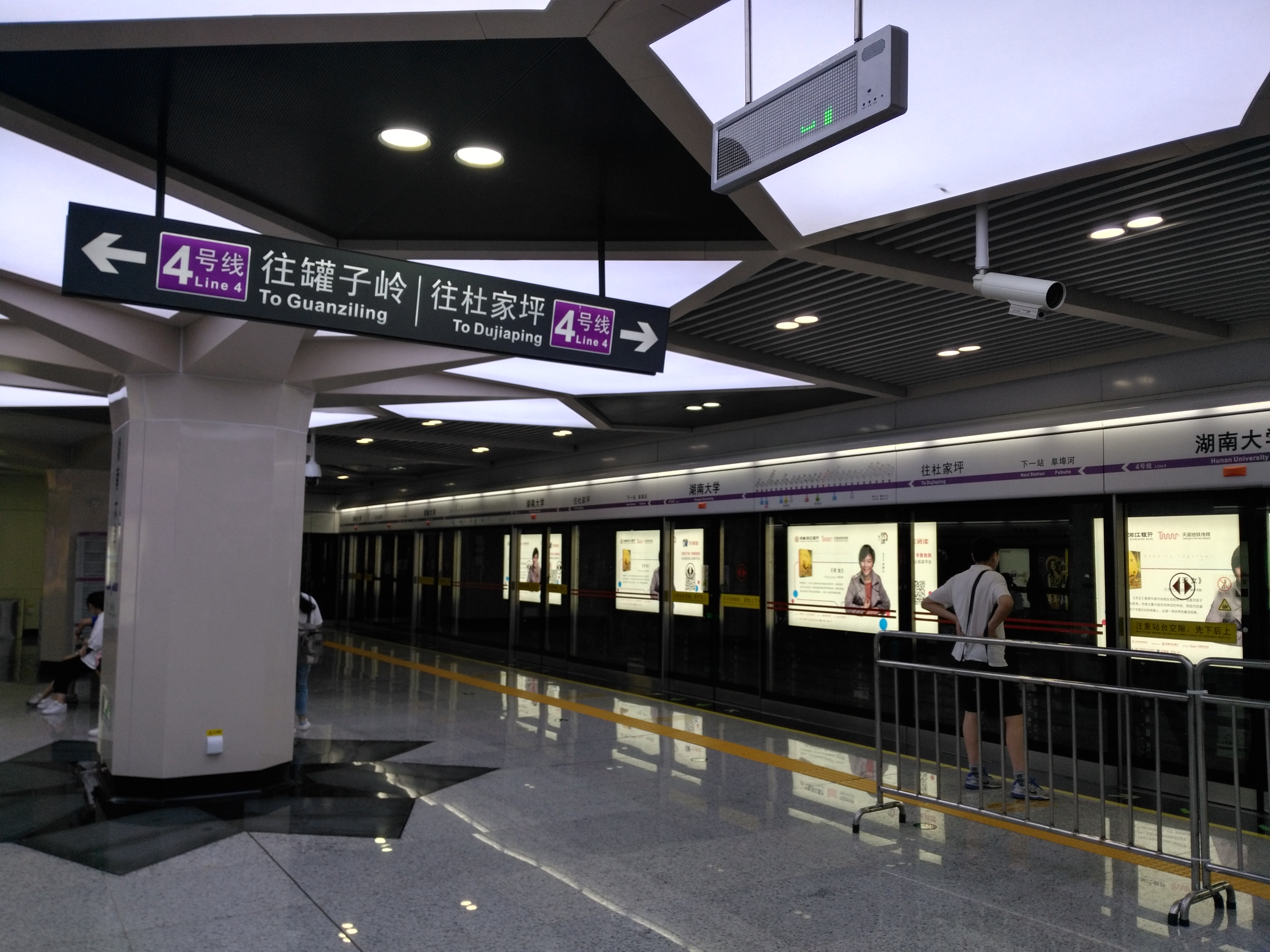 长沙地铁四号线湖南大学站使用了特殊的装修风格